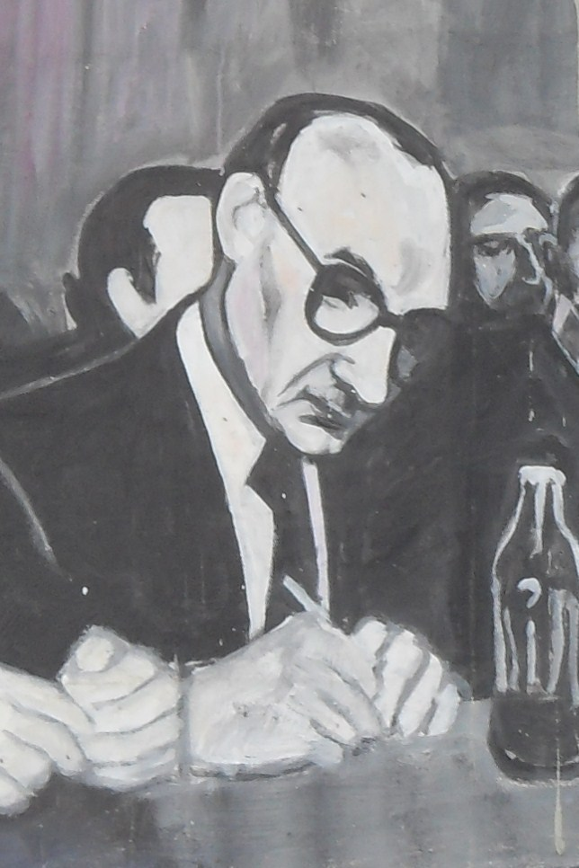 Mieczysław Jagielski - działacz komunistyczny. W latach 1971–1981 był członkiem Biura Politycznego KC PZPR, w 1970–1981 był wicepremierem. Mural w Gdańsku, na wiadukcie ul. Okopowej, przedstawia Mieczysława Jagielskiego podpisującego porozumienia sierpniowe w Gdańsku, w dniu 31 sierpnia 1980.